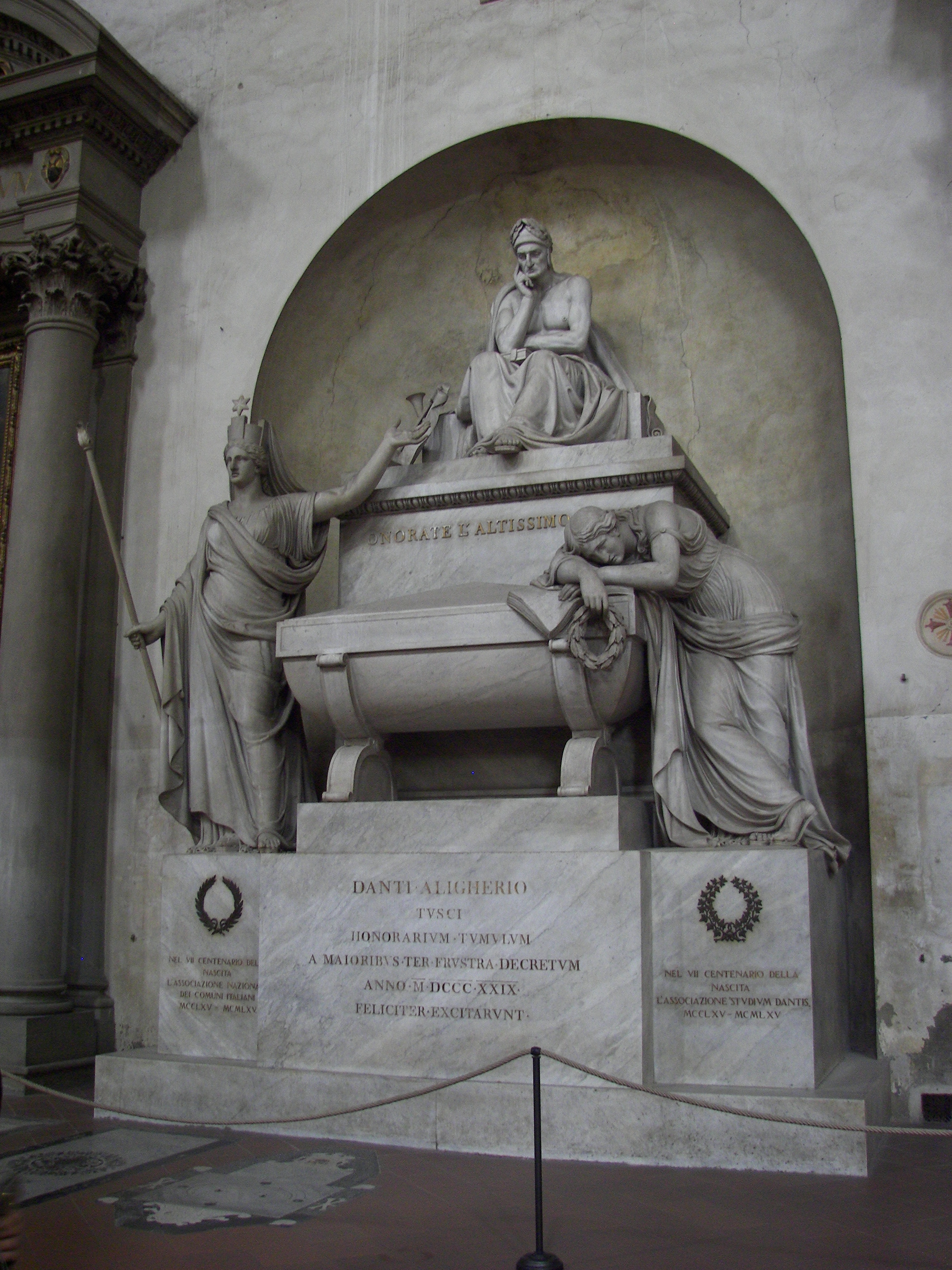 Cenotaph for Dante Alighieri in Santa Croce in Firenze.